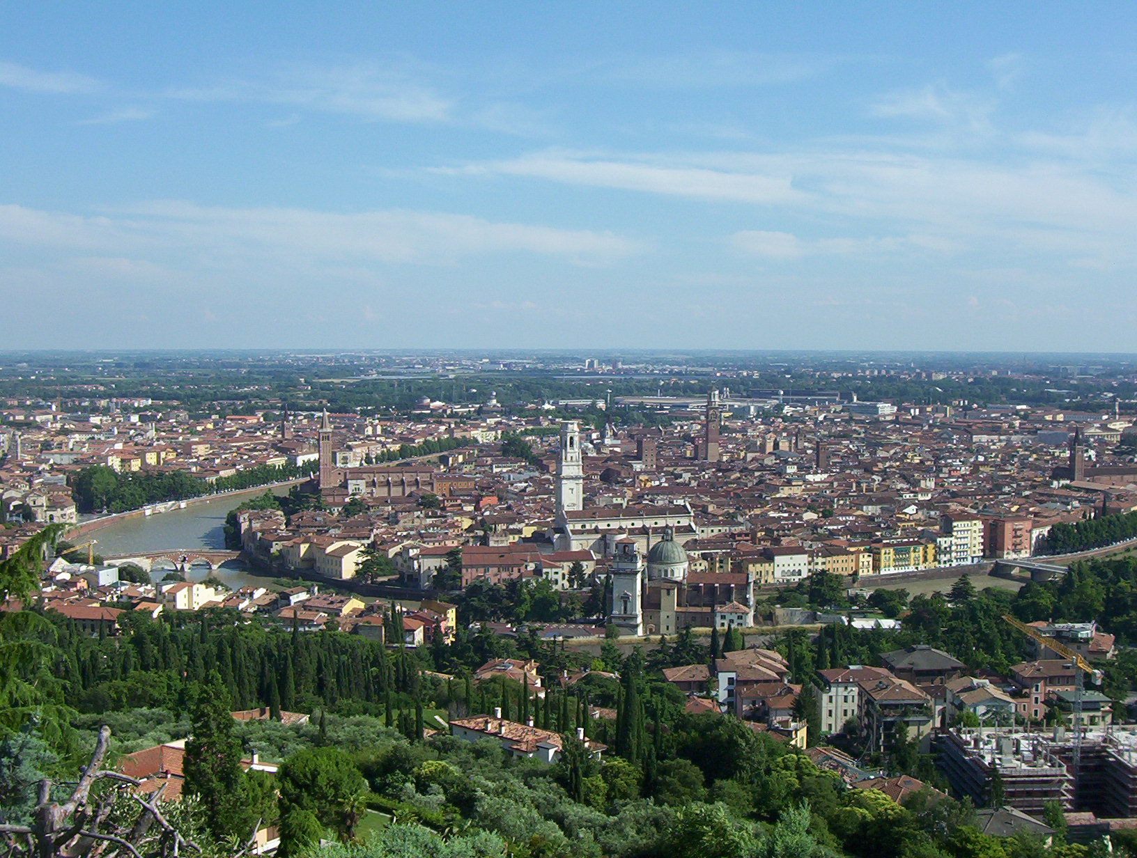 Panorama del centro storico di Verona da forte San Leonardo